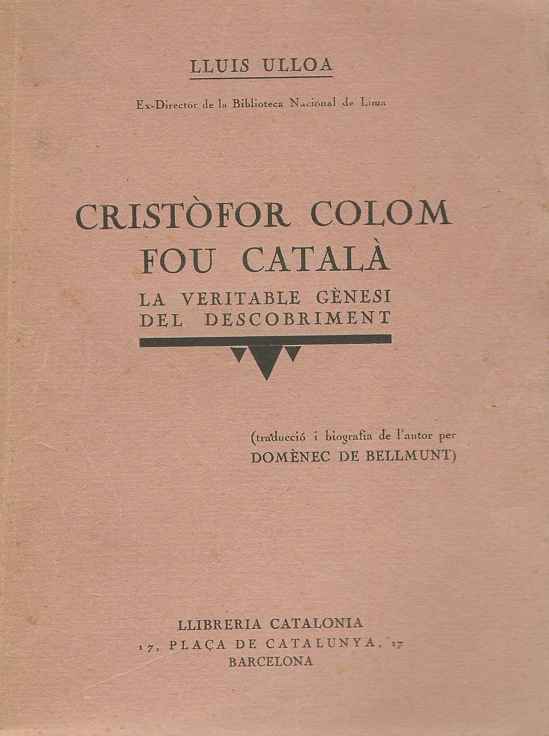 Llibre de Lluis Ulloa publicat l'any 1927, Titul Cristòfol Colom fou català. Traductor Domènec de Bellmunt.